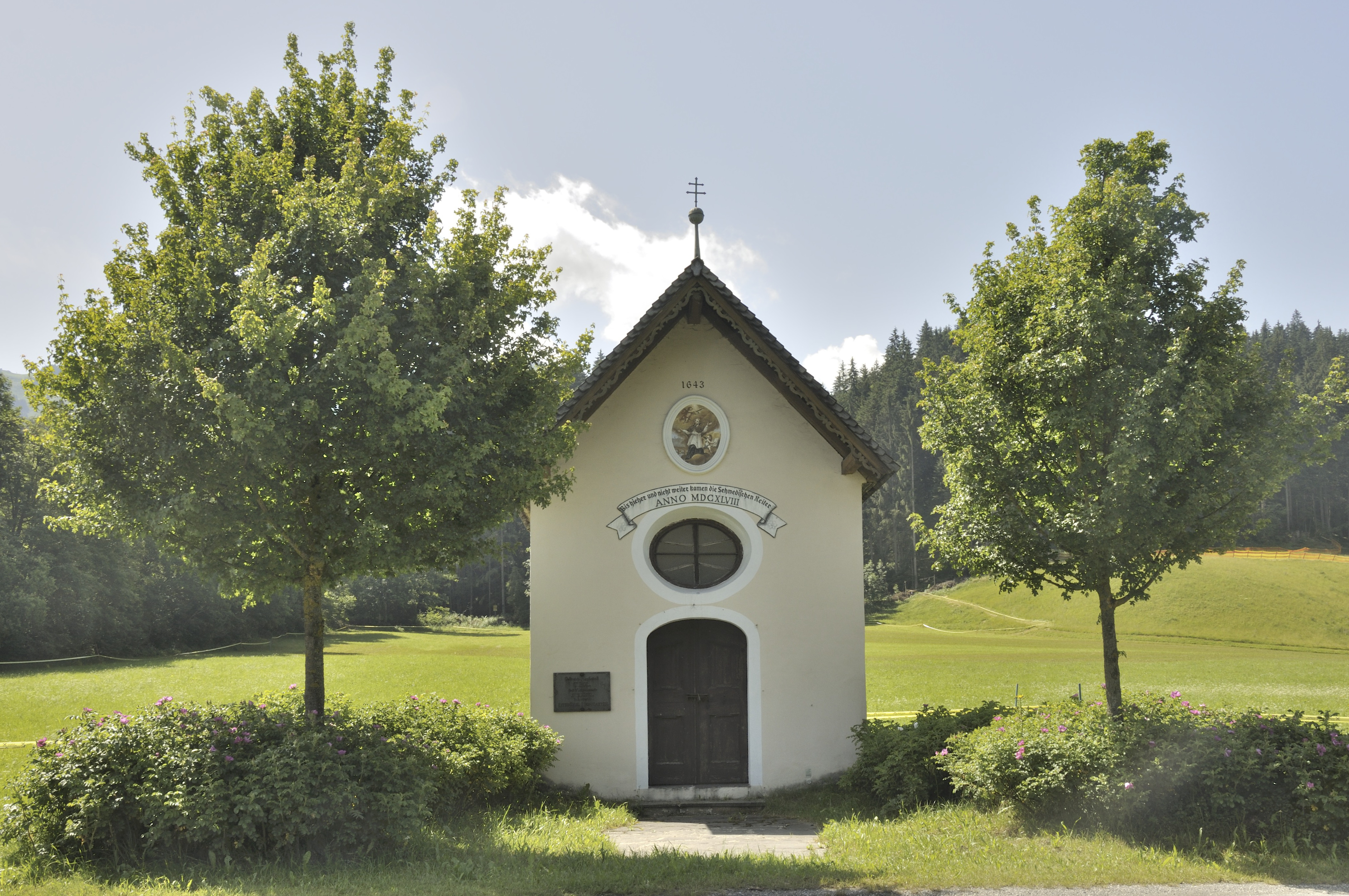 Klausen-Kapelle, Schweden-Kapelle